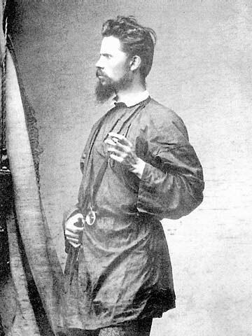 Иван Николаевич Крамской. 1865, Фотография.